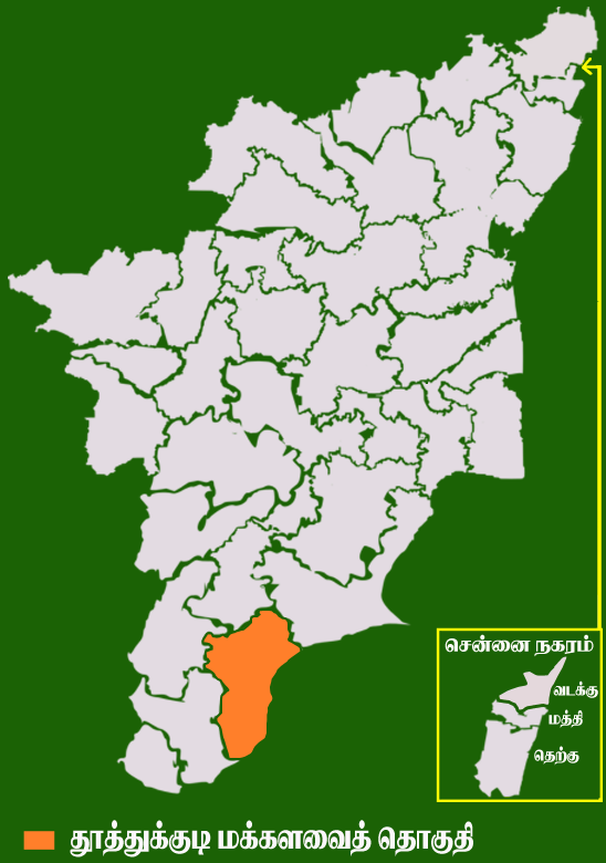 தமிழக வரைபடத்தில் உள்ள தூத்துக்குடி மக்களவைத் தொகுதி